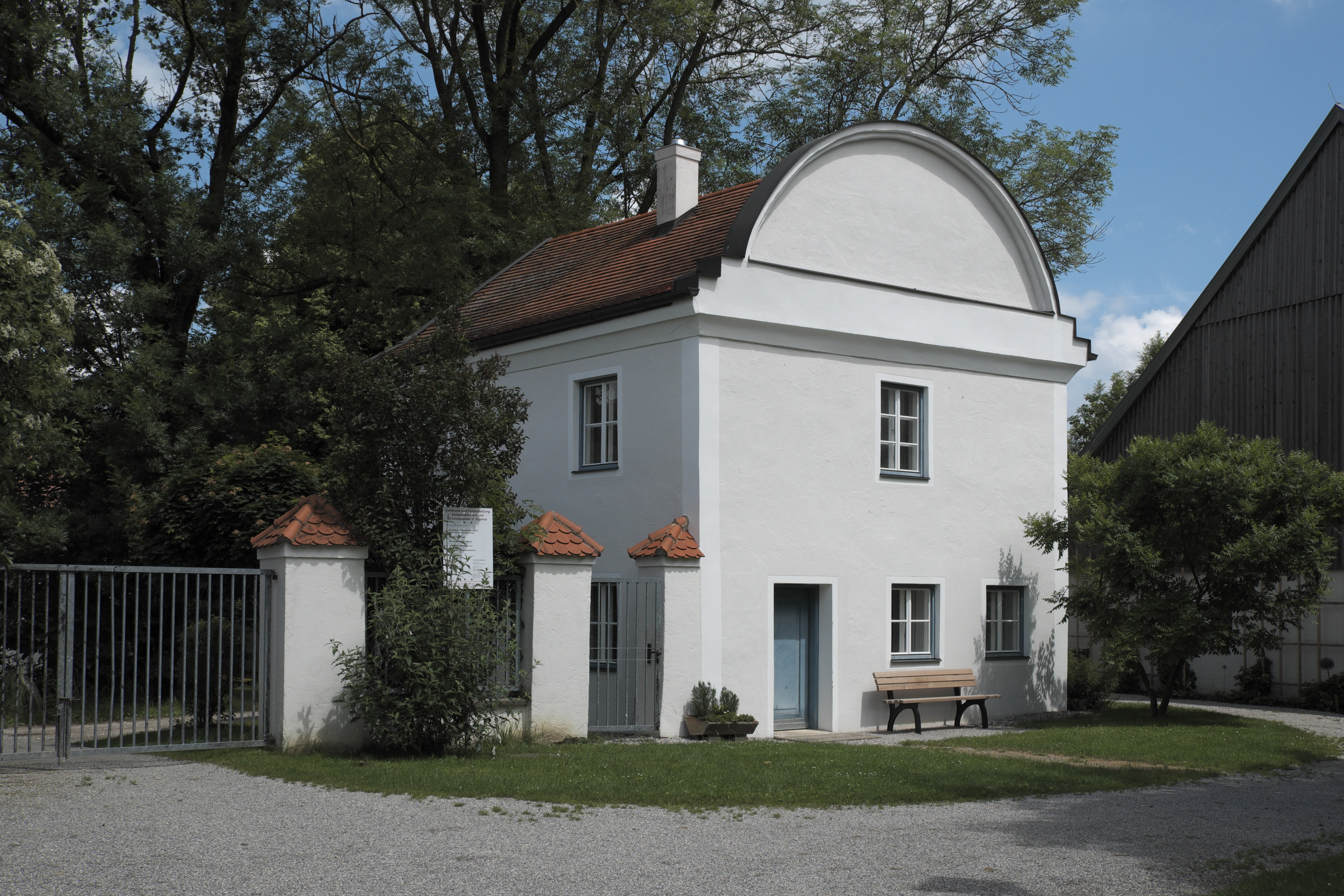 Ehemaliges Benefiziatenhaus des Klosters Spielberg in Oberschweinbach im Landkreis Fürstenfeldbruck (Bayern/Deutschland)